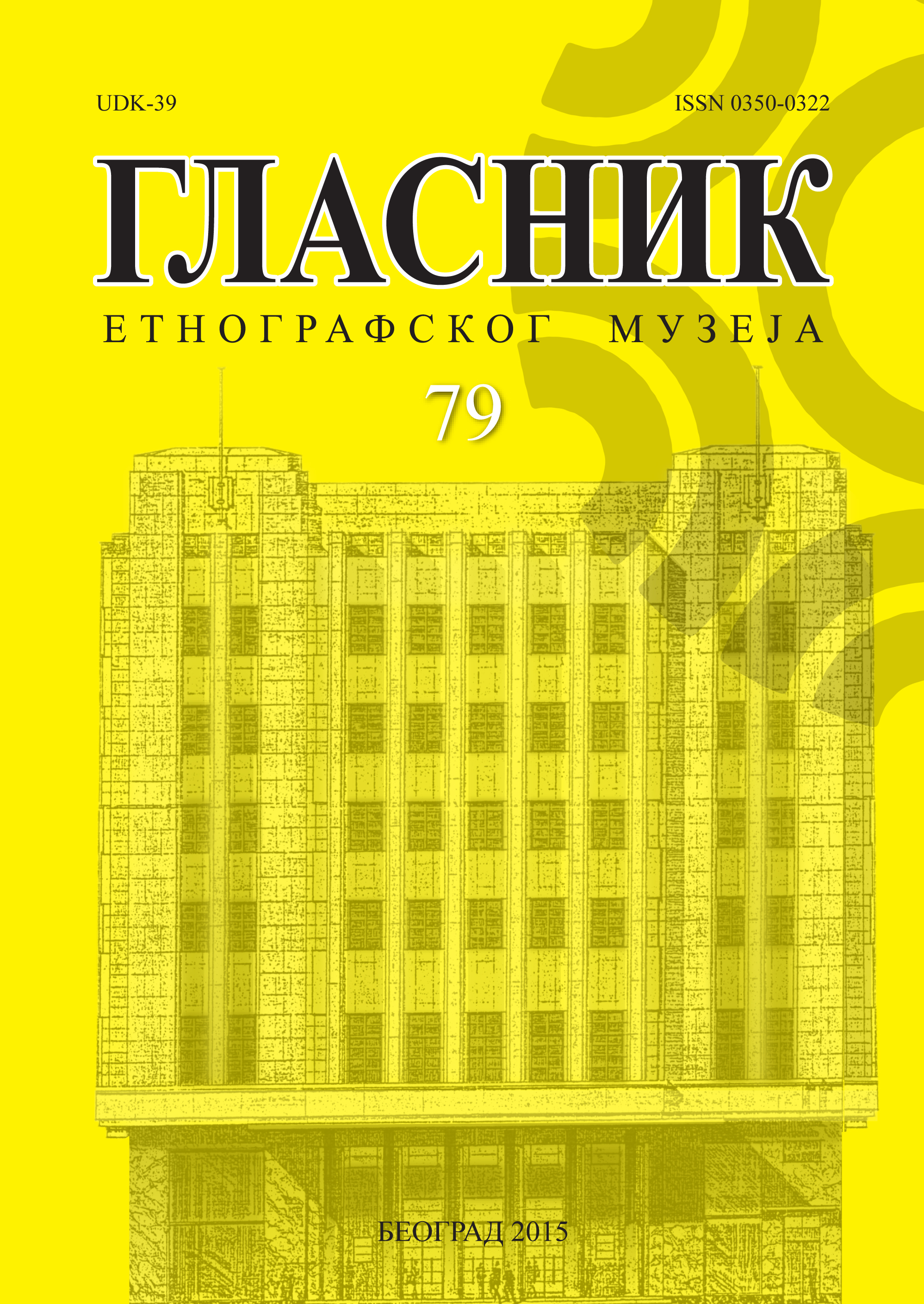 Korica Glasnika Etntografskog muzeja u Beogradu